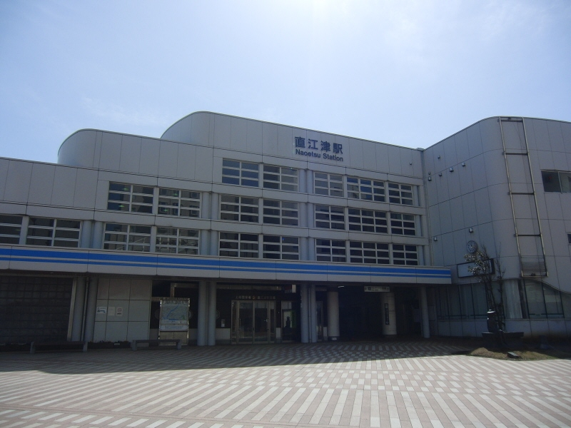 直江津駅の駅舎です。